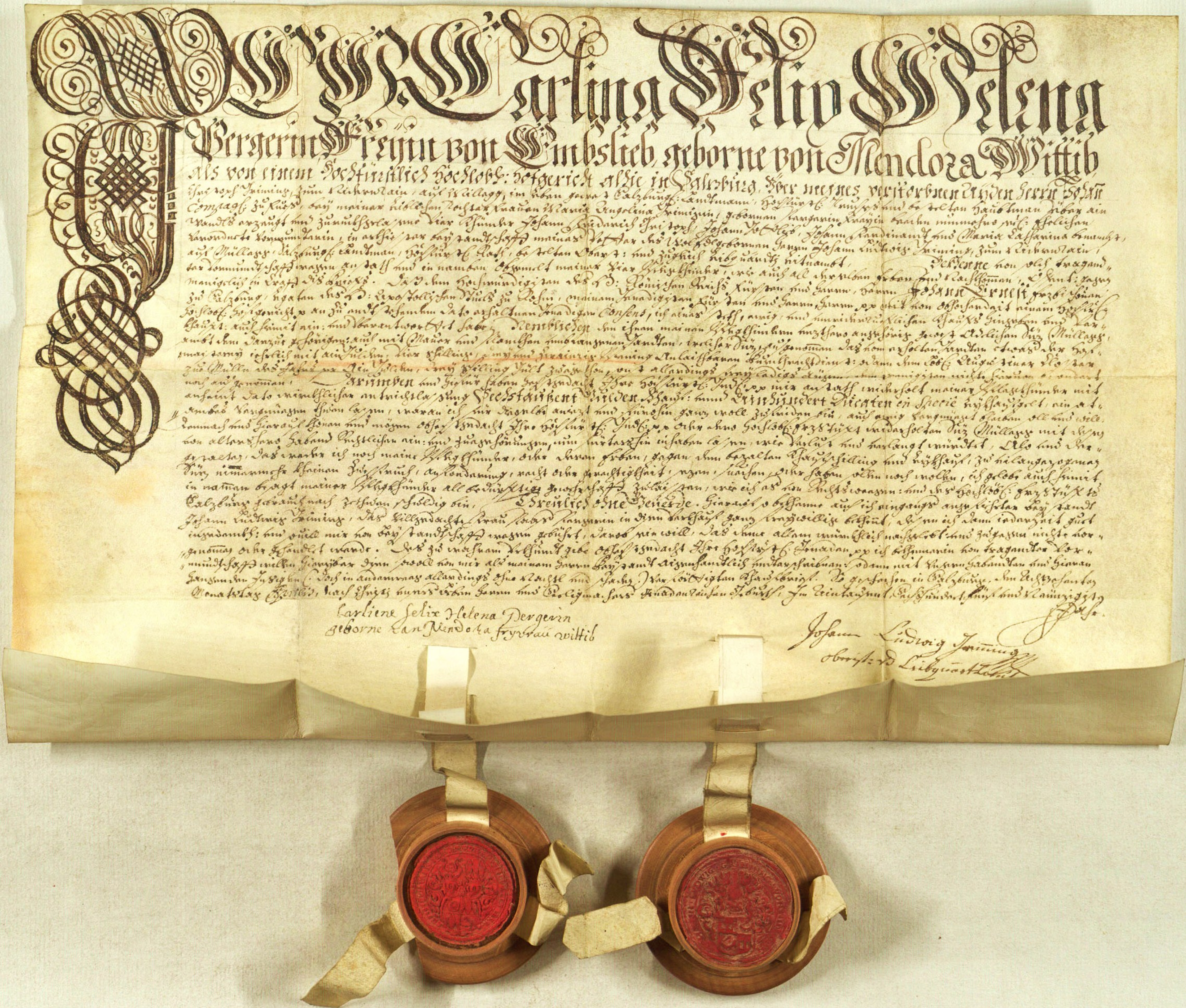 Leihkaufsvertrag von 1695 über Schloss Müllegg: Die verwitwete Freifrau Carlina Felix Helena Perger von Emslieb, geb. von Mendoza, verkauft als Vormund für ihre Enkelkinder, die vier Kinder ihres verstorbenen Schwiegersohns, des Hoftruchsesses Johann Christoph Griming zum Niderrain, auf Müllegg, und ihrer Tochter Maria Angelina Griming, geb. Perger von Emslieb, nämlich Johann Friedrich Christoph, Johann Gottlieb, Johann Ferdinand und Maria Catharina Griming zum Niderrain, mit Unterstützung ihres Vetters, des Hofrats, Obersts und Leibgardeleutnants Johann Ludwig Griming zum Niderrain, auf Müllegg, dem Erzbischof Johann Ernst von Salzburg den adeligen Sitz Müllegg samt Zugehör um 6000 fl. und 100 Dukaten Leihkauf. Anhängende Siegel: 1.: Wappen Perger von Emslieb, 2.: Grimming zum Niederrain